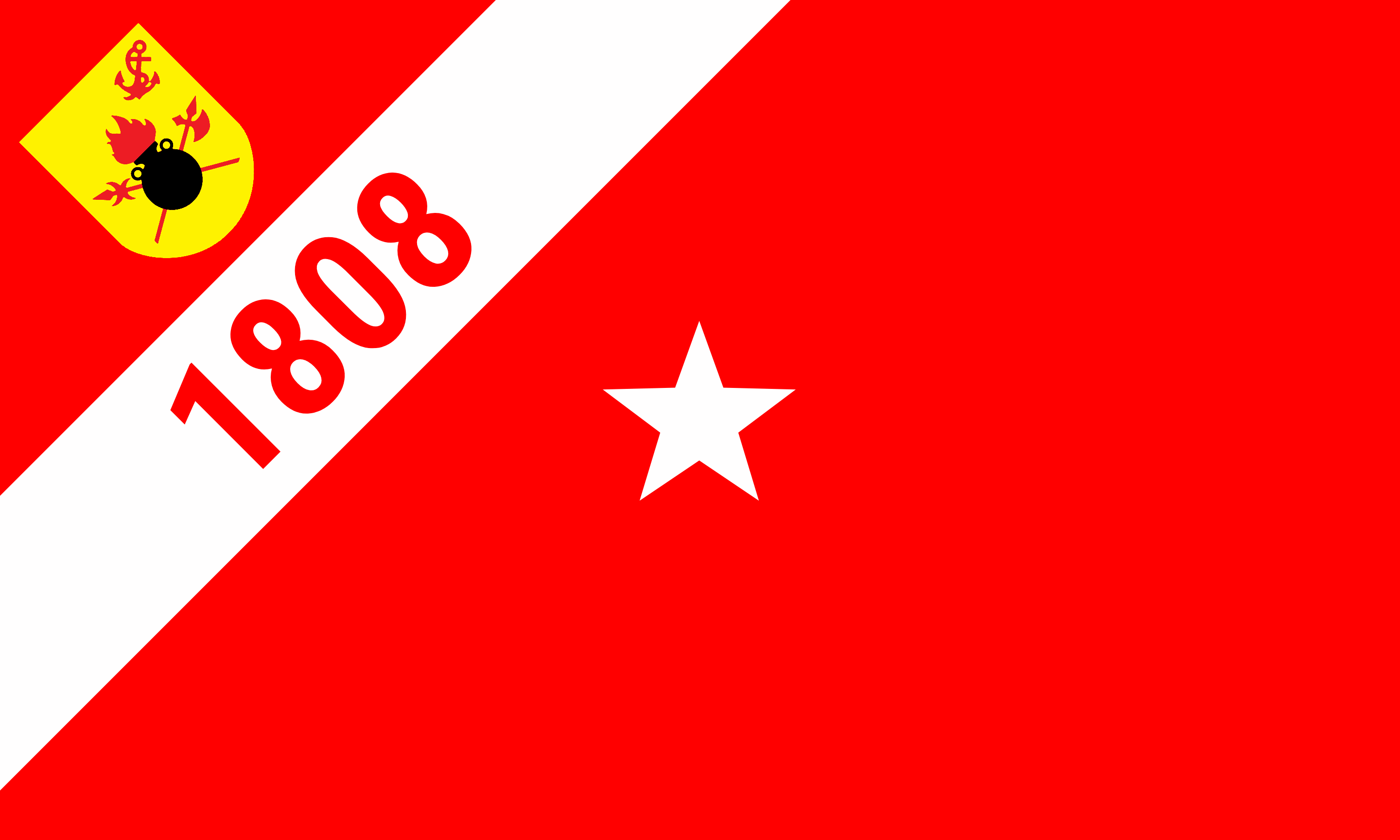 Insignia of Brazilian Marines